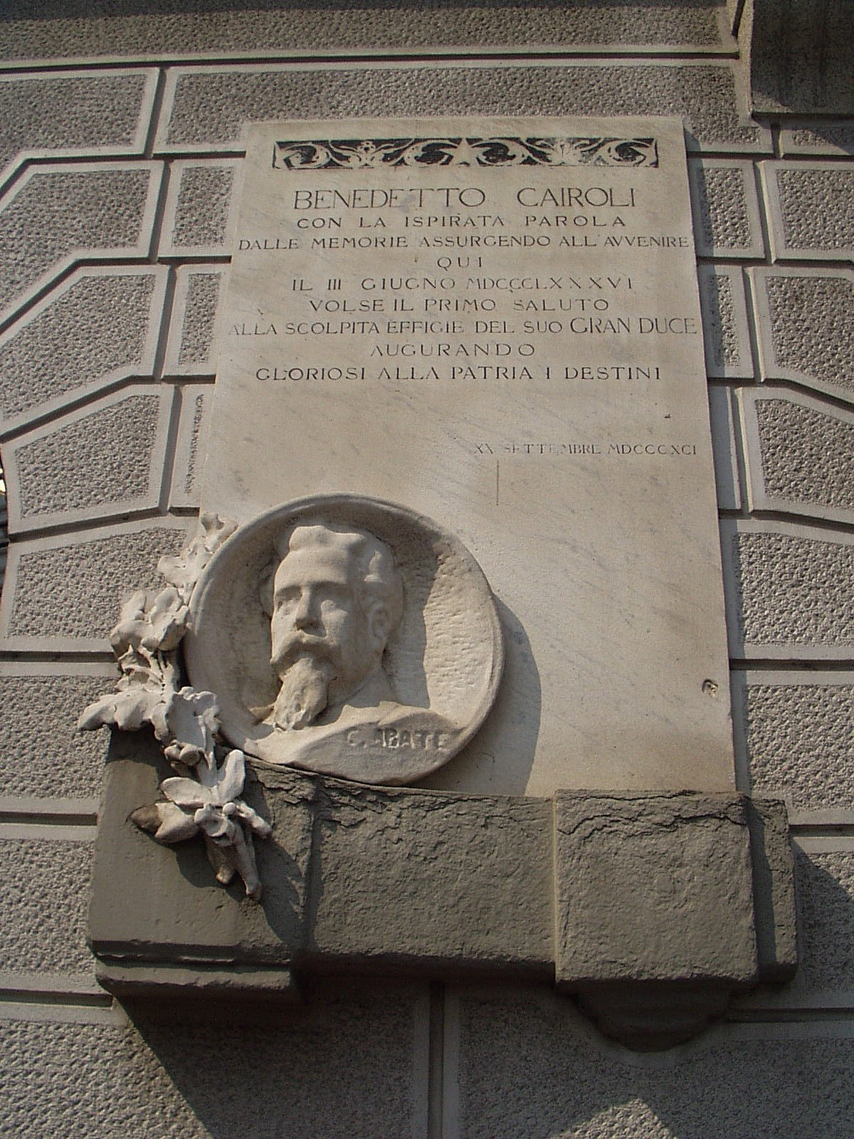 Monza lapide commemorativa in piazza Garibaldi del 20.9.1891 dedicata a Benedetto Cairoli (1825-1889) garibaldino e Presidente del Consiglio dei Ministri - opera firmata C. Abate